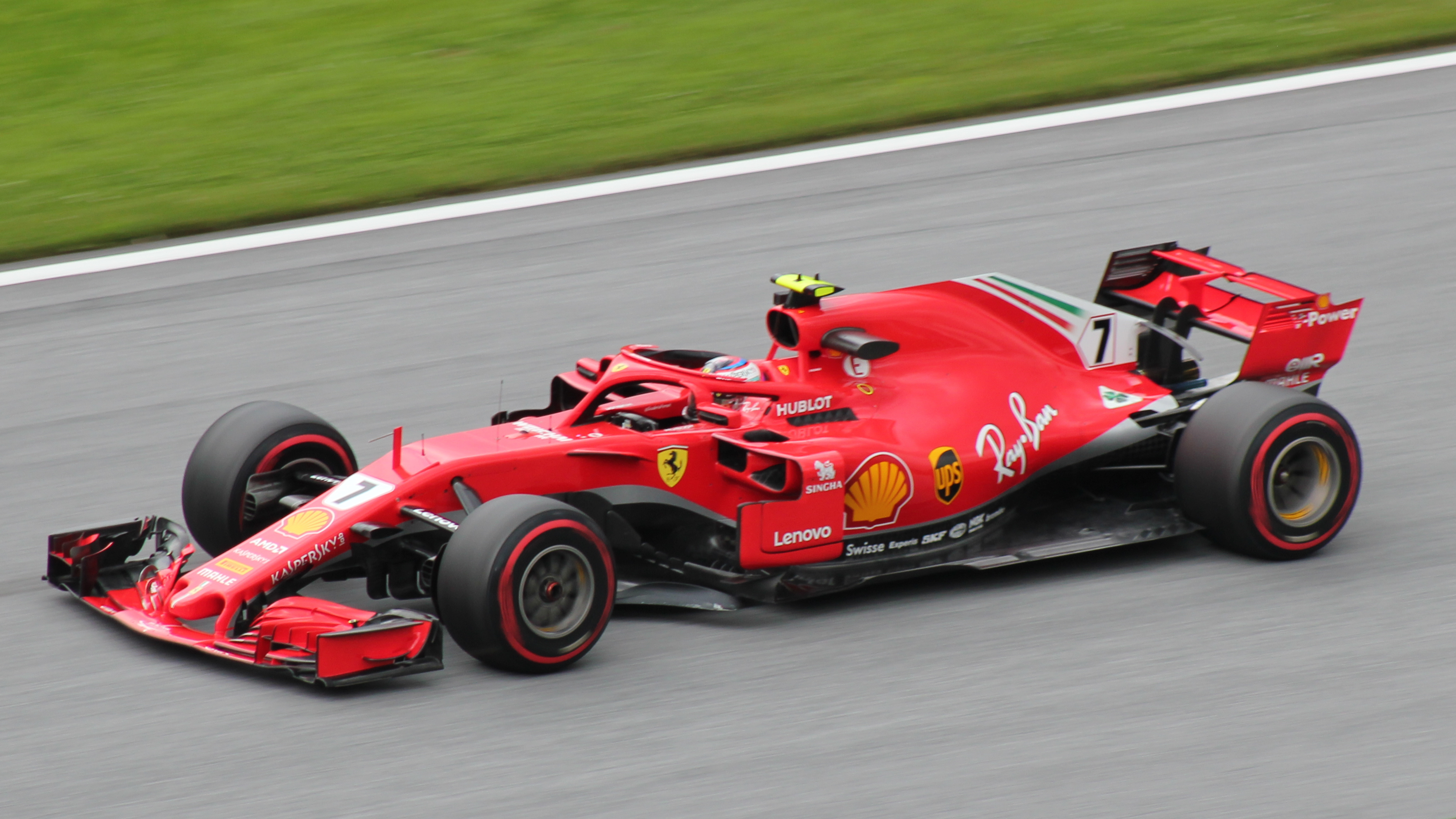 7 Räikkönen beim Rennwochenende in Österreich 2018